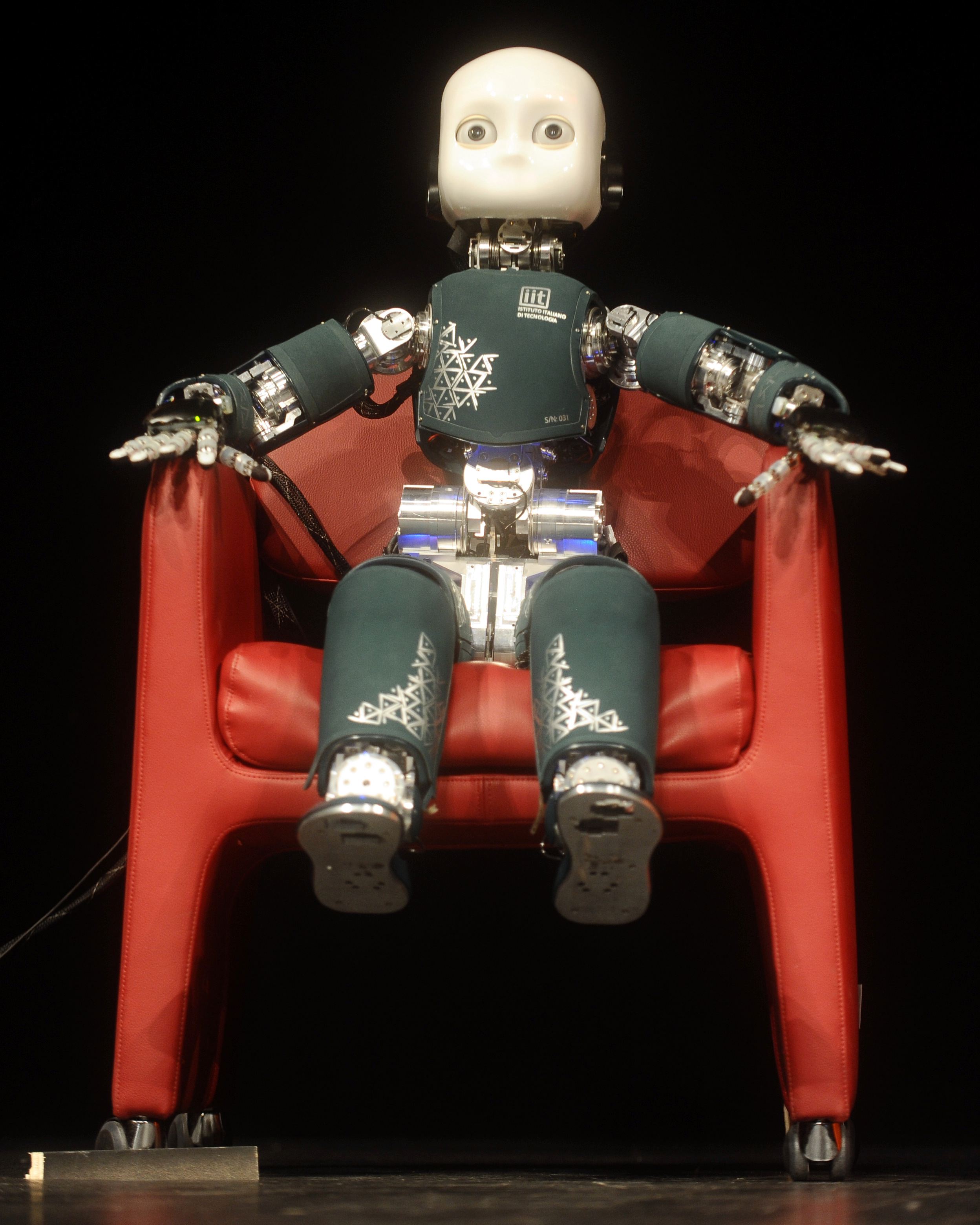 ICub al Festival dell'Economia di Trento.